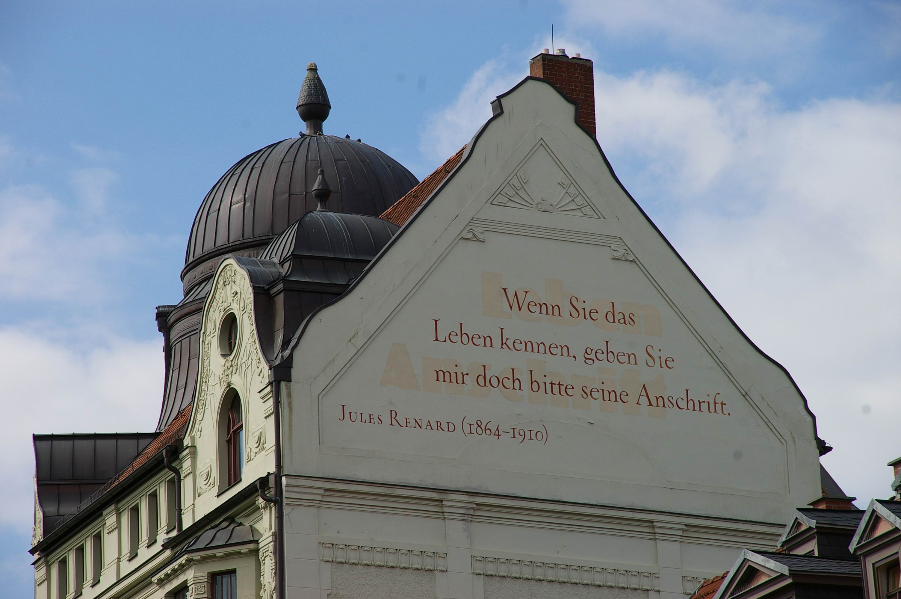 Spruch von Jules Renard an einer Hauswand in Weimar